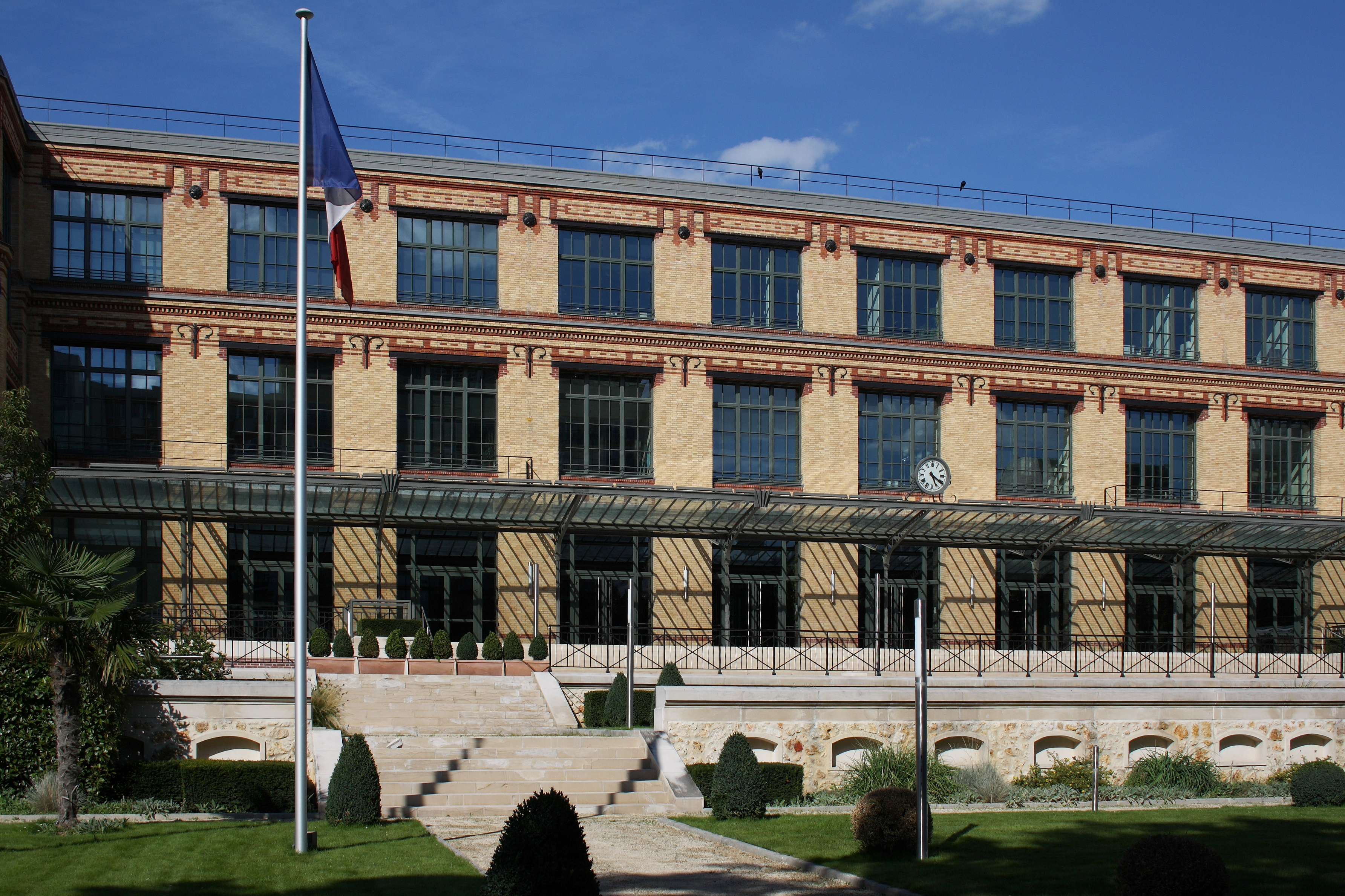 Ehemaliges Gebäude der Imprimerie Nationale, 27, rue de la Convention, im 15. Arrondissement in Paris